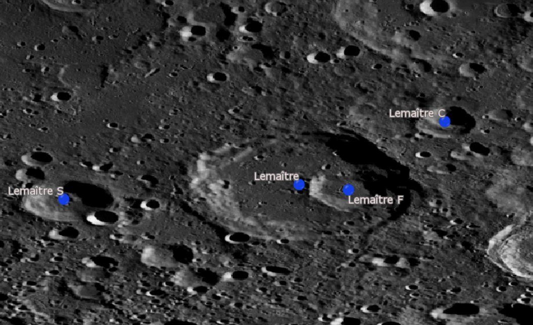 Cráter lunar Lemaître. Cráteres satélite. (Imagen LRO)